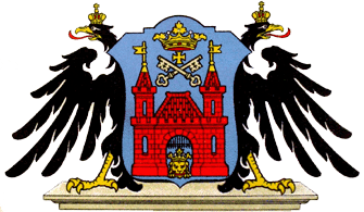 Altes Wappen der Stadt Riga